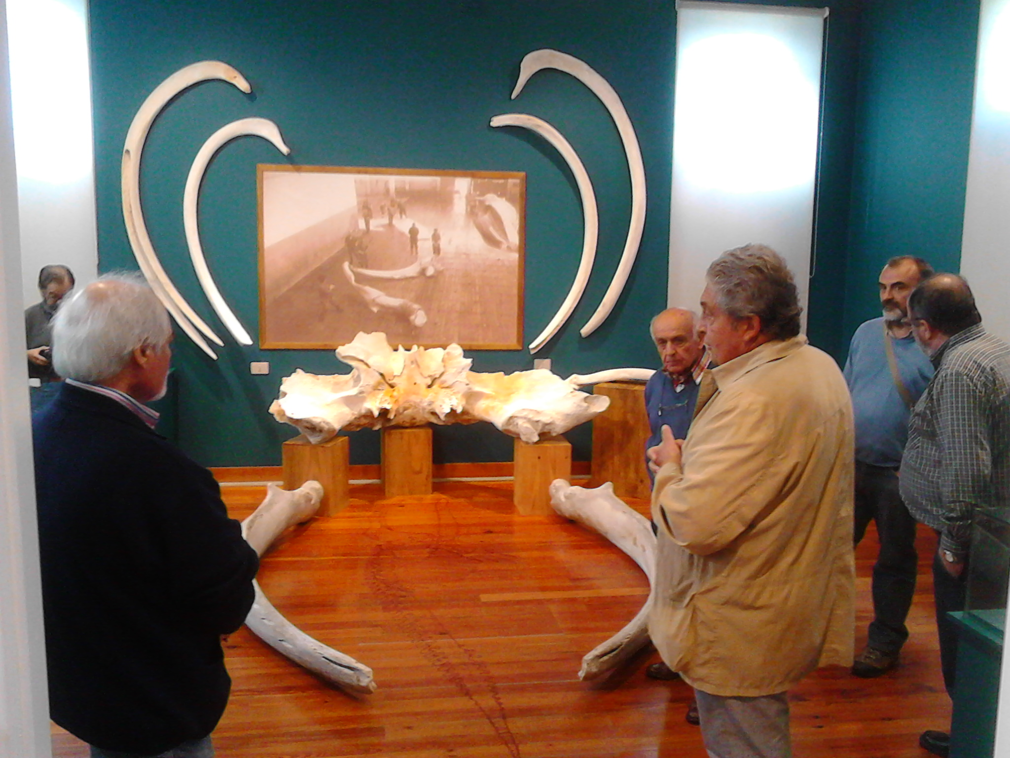 Actividade da AVV O Tesón con Os Aventados no Museo do Mar de S. Cibrao